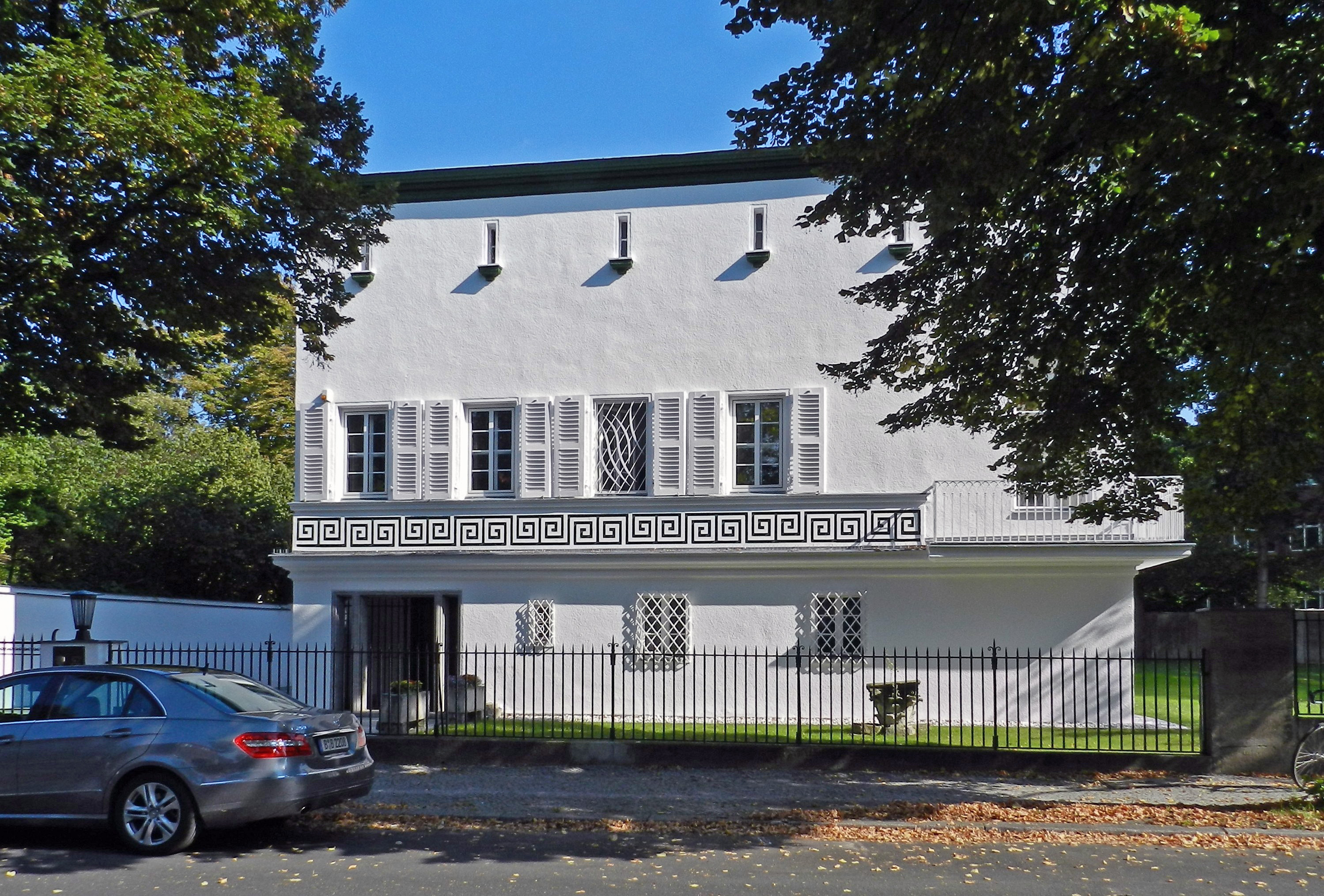 Landhaus, Binger Straße 51/52, Berlin-Wilmersorf. Bauzeit: 1924-25, Architekten: Pauk Mebes, Paul Emmerich, Bauherr: Geheimrat Hans Riese.